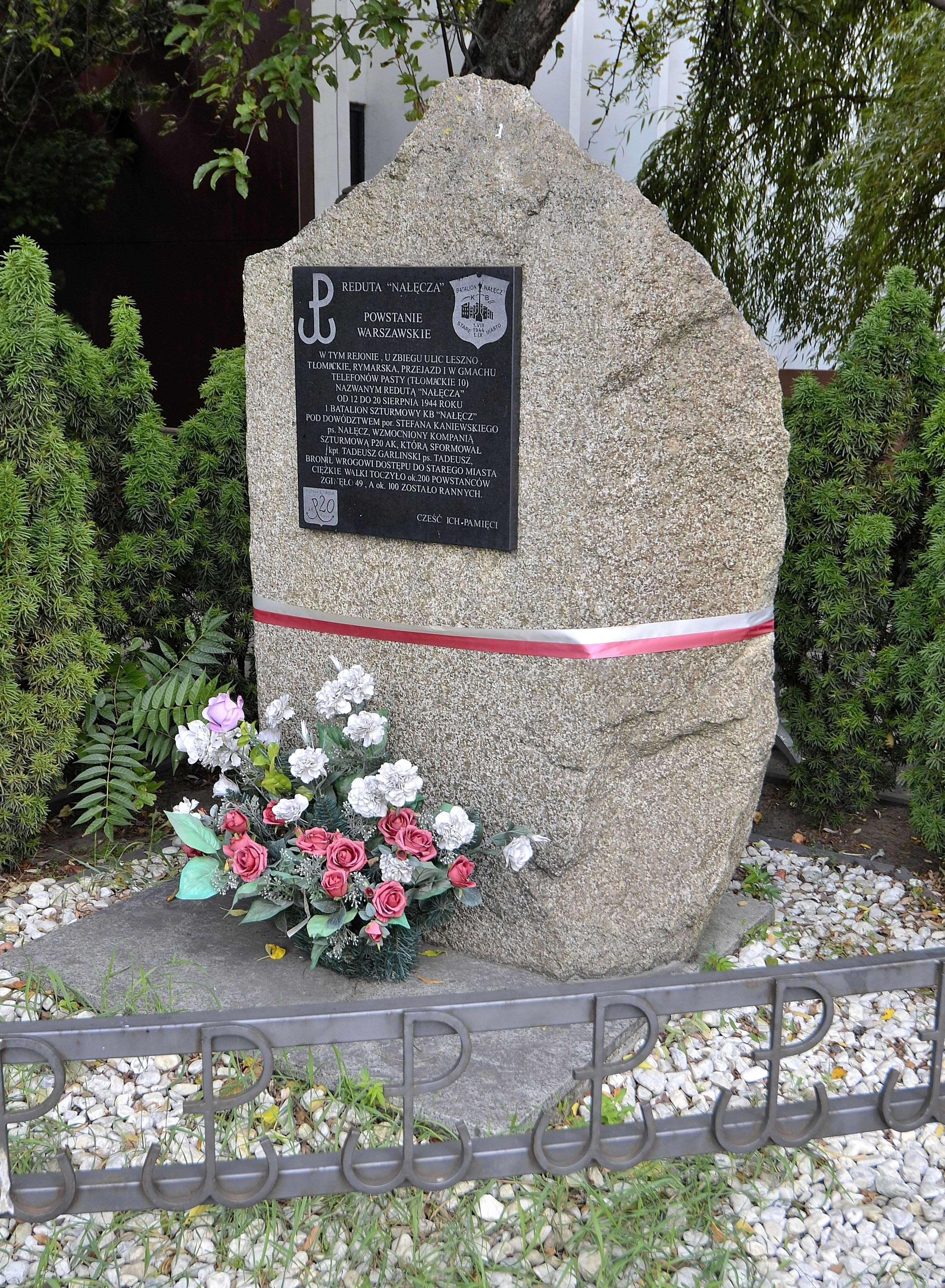 Upamiętnienie Reduty "Nałęcza" przy al. "Solidarności" w Warszawie